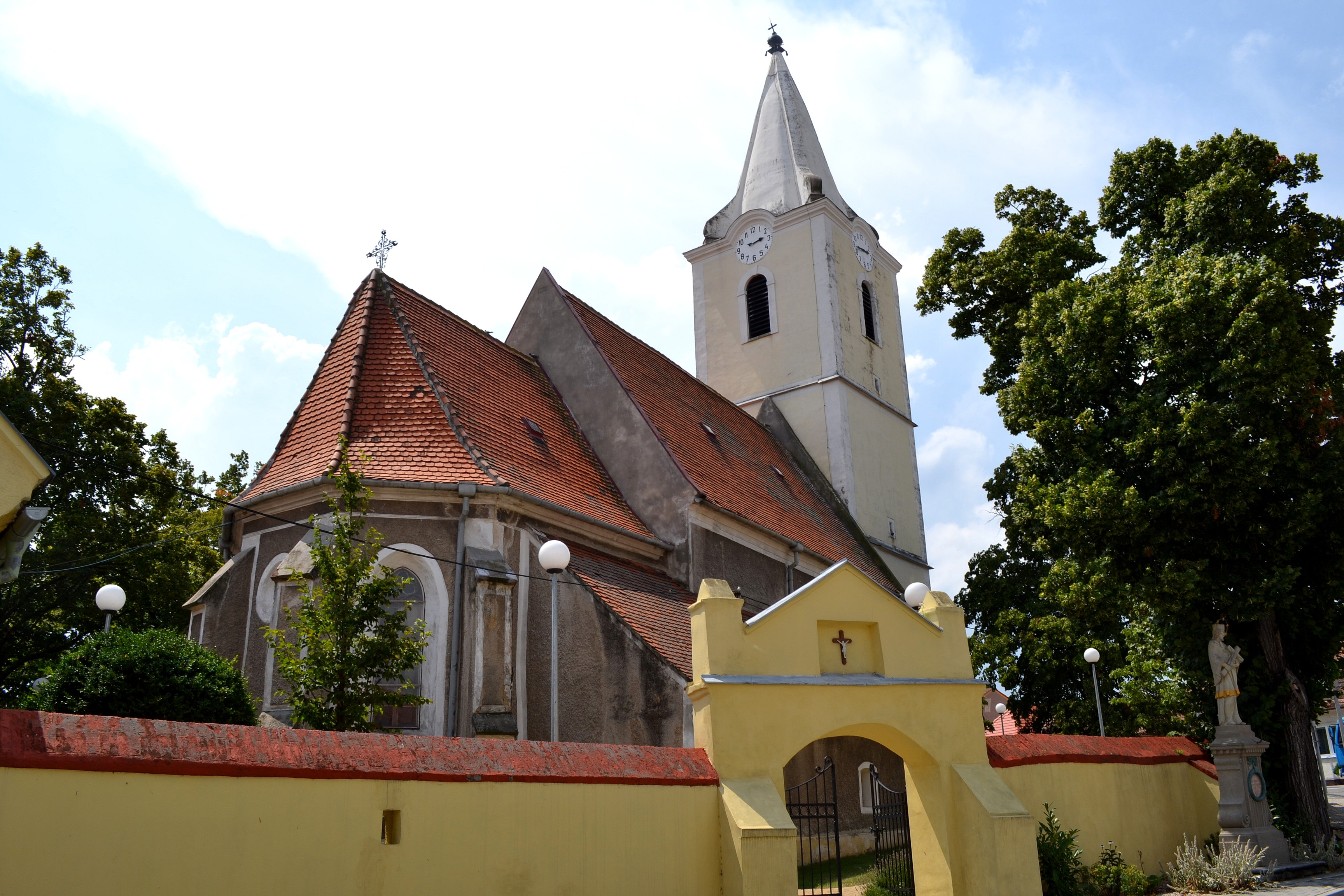 Kostol Nanebovzatia Panny Márie v Dolných Orešanoch; celkový pohľad zo severovýchodu. Gotická stavba zo 14. storočia je najstaršou architektonickou pamiatkou v obci